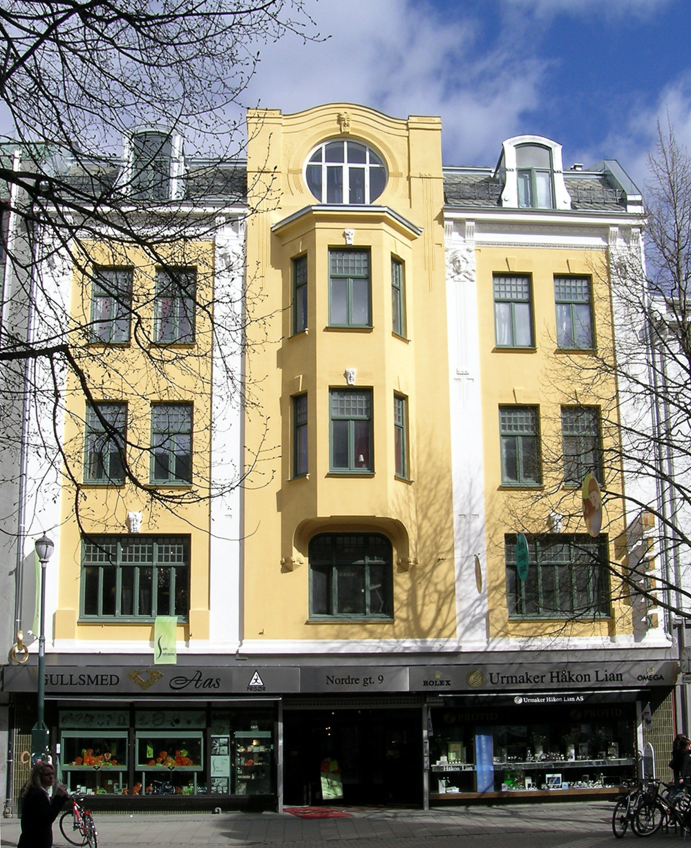 Nordre gate 9, Trondheim. Bygd 1903. arkitekt: Karl Norum.